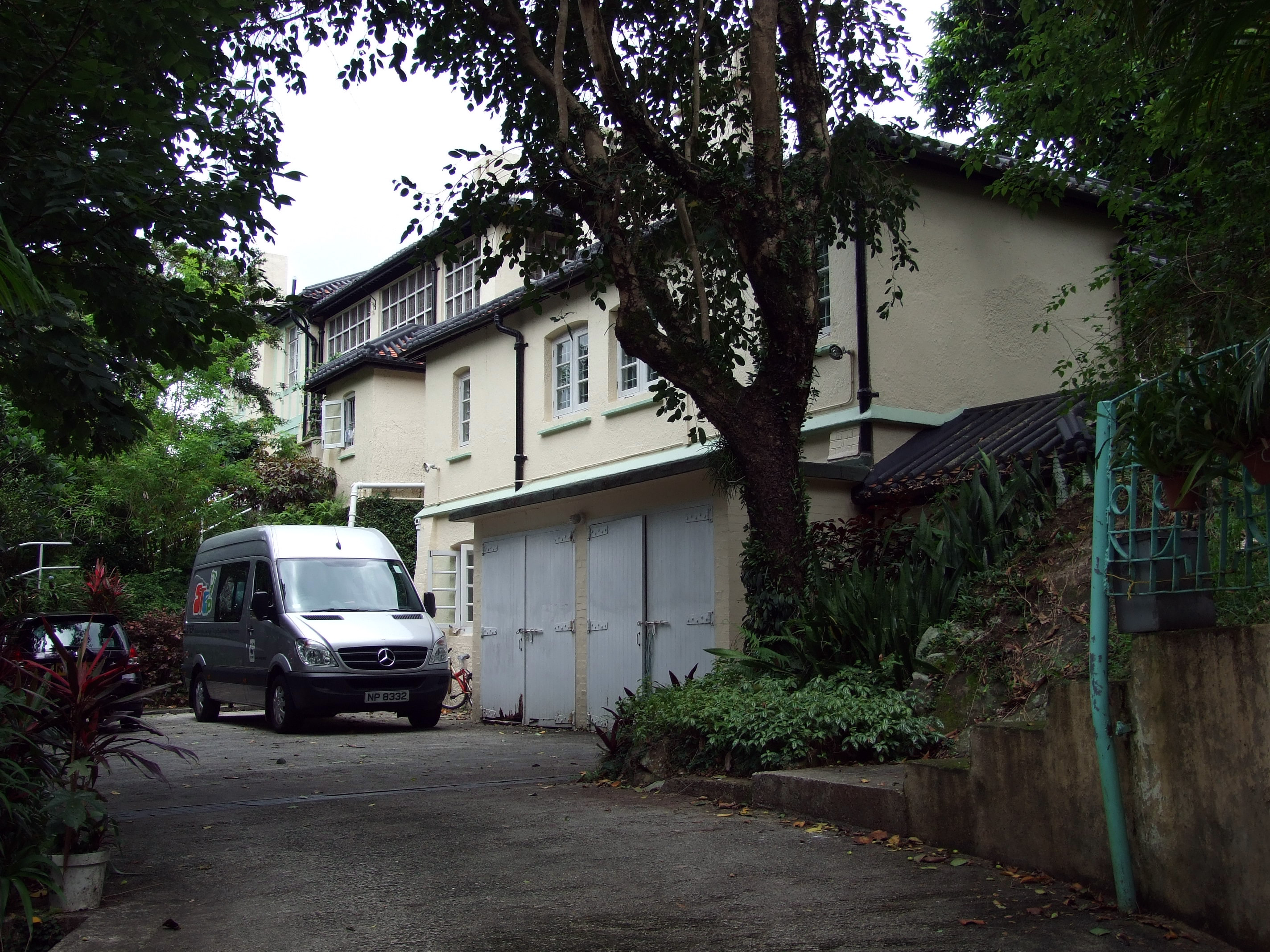 世界自然基金会元洲仔自然環境保護研究中心